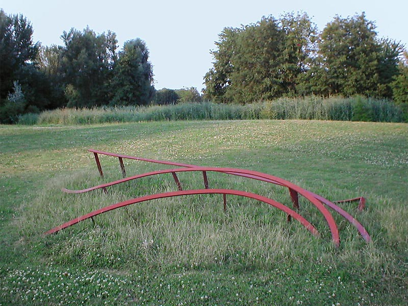 Stahlskulptur Heilbronner Stück von Bernd Hennig (1985) im Wertwiesenpark, Heilbronn